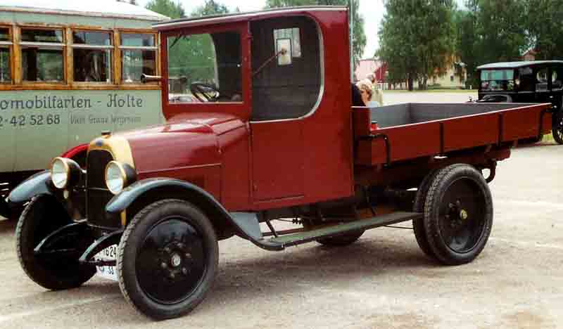 Fiat 505F Truck 1924.